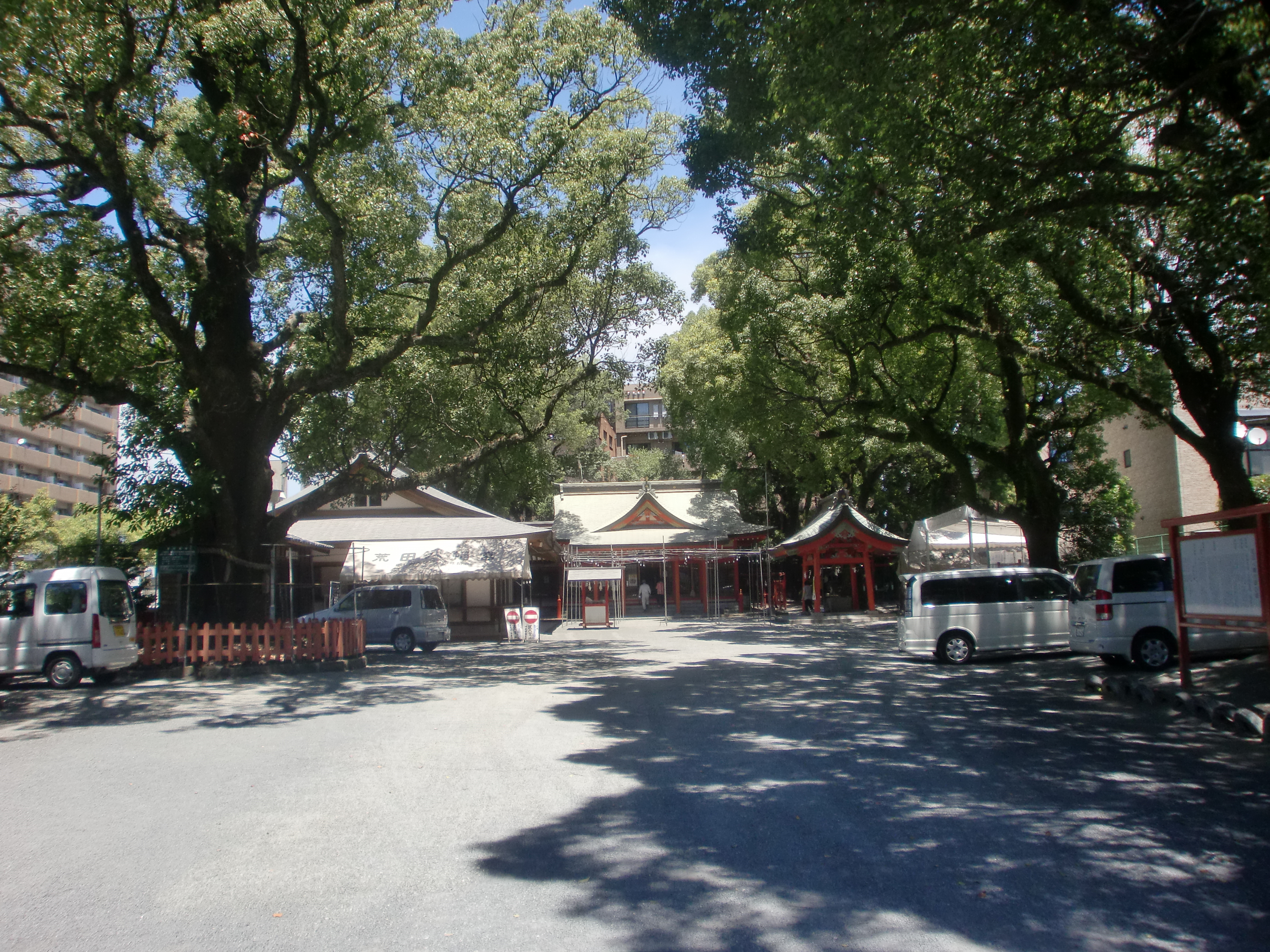 荒田八幡宮 本殿